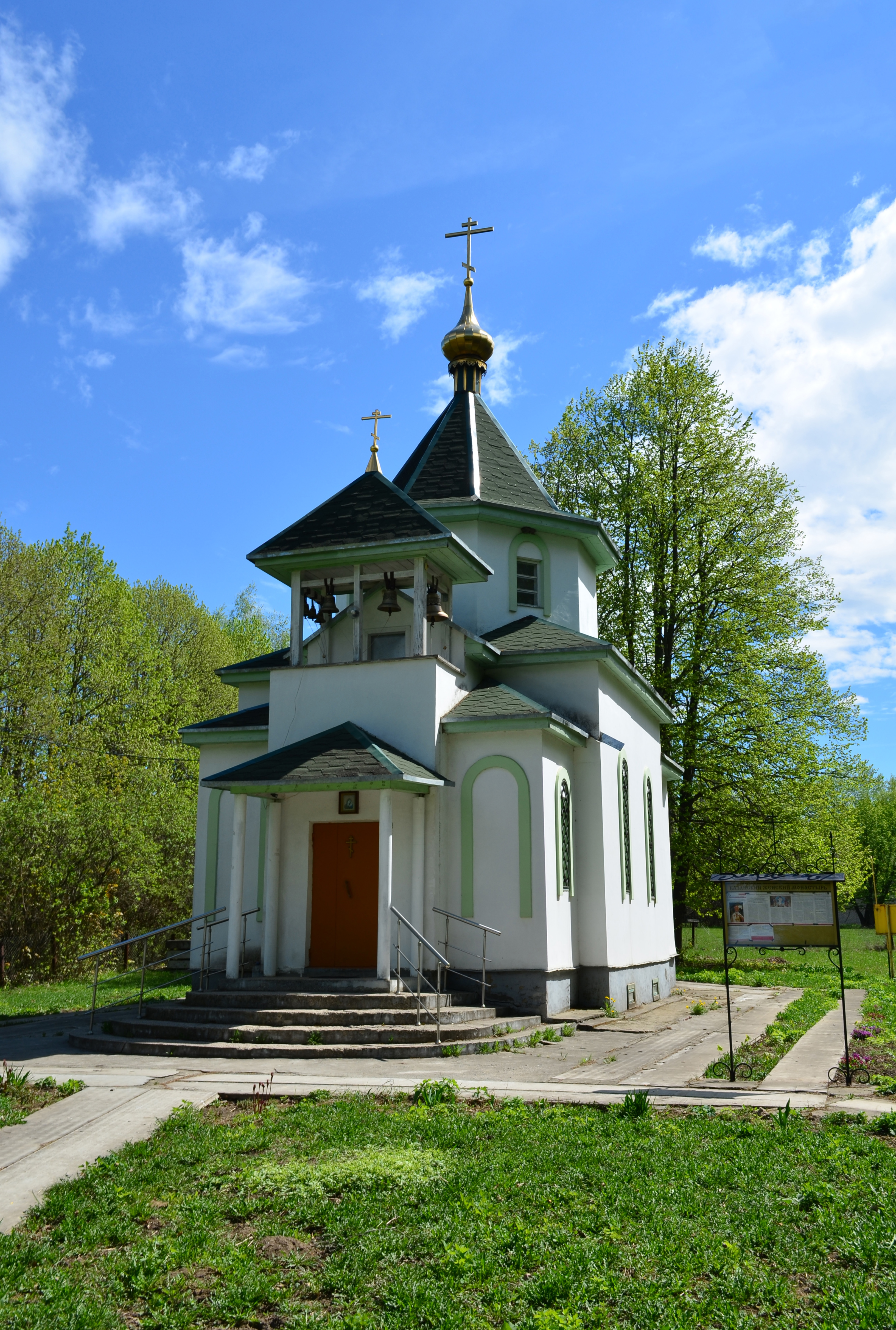 Рязанская область,Рязанский район,село Вышетравино.Казанский храм.